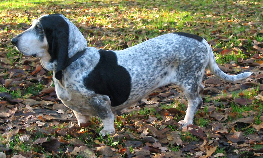 Basset bleu de Gascogne